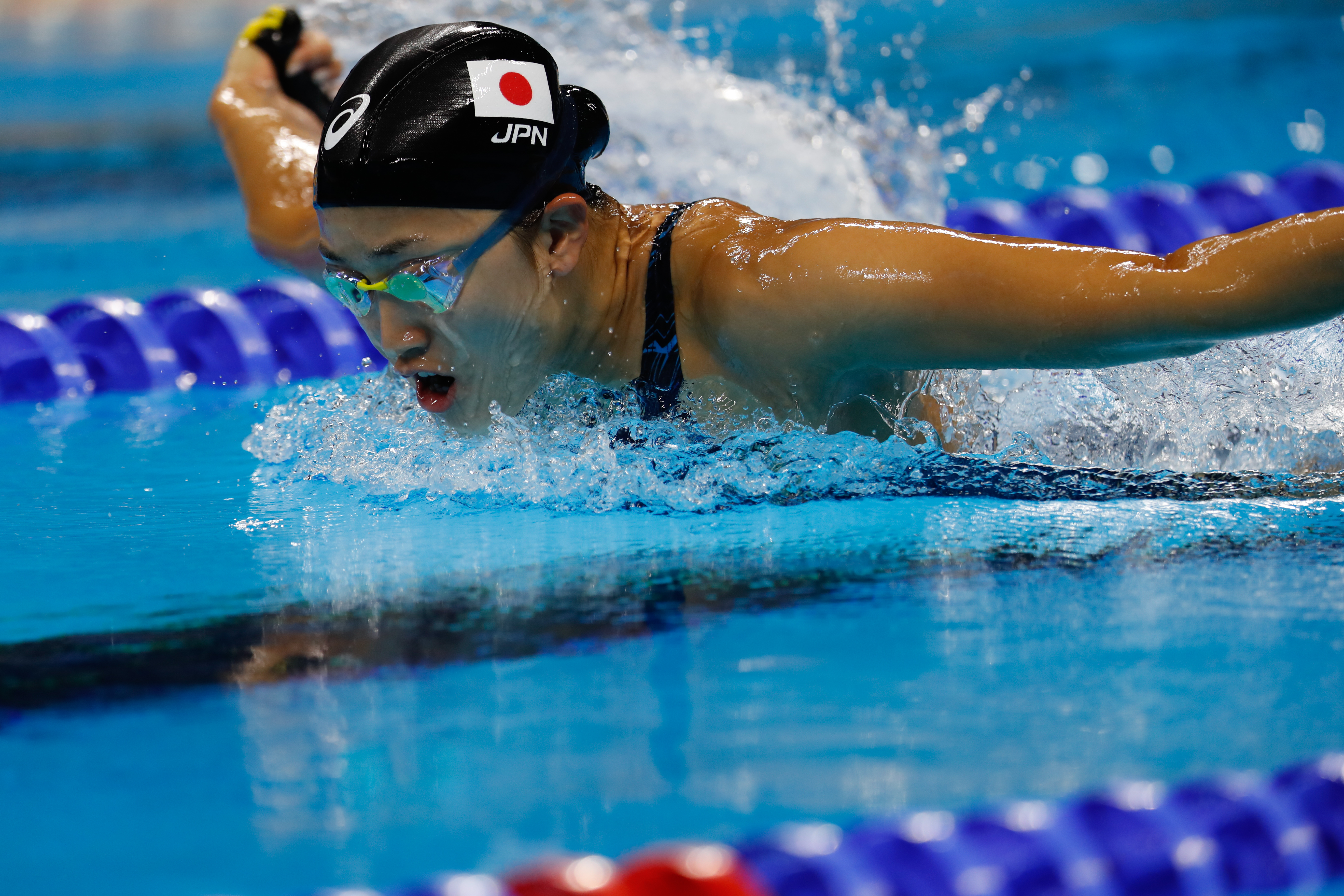 Rio de Janeiro - Atletas da equipe natação do Japão treinam na piscina do Estádio Aquático, no Parque Olímpico da Barra da Tijuca (Fernando Frazão/Agência Brasil)